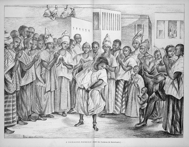 A Damalice Foubine : Danse des Ouoloves de Saint-Louis (illustrations de Côte occidentale d'Afrique du Colonel Frey) (Pl. en dble page après p.43 [Cote : Réserve A 200 386]